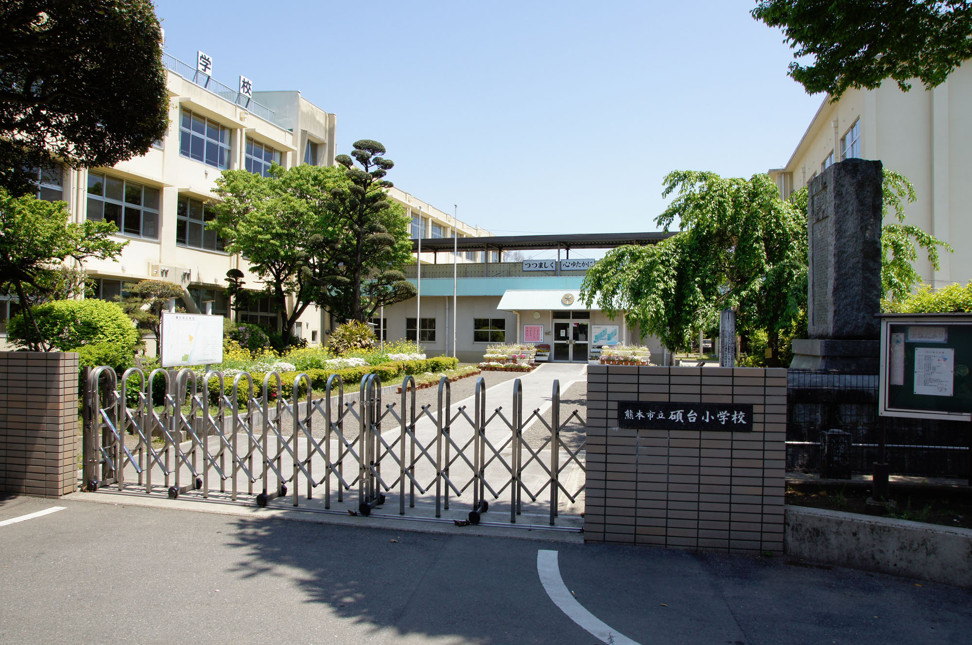 熊本市立碩台小学校